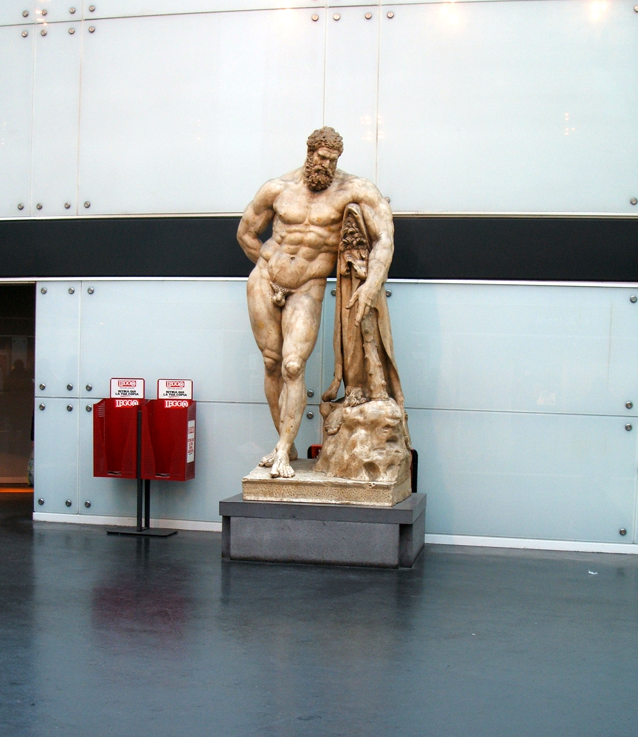 Copia in gesso dell'Ercole Farnese, esposta nella stazione "Museo" della Metropolitana di Napoli.